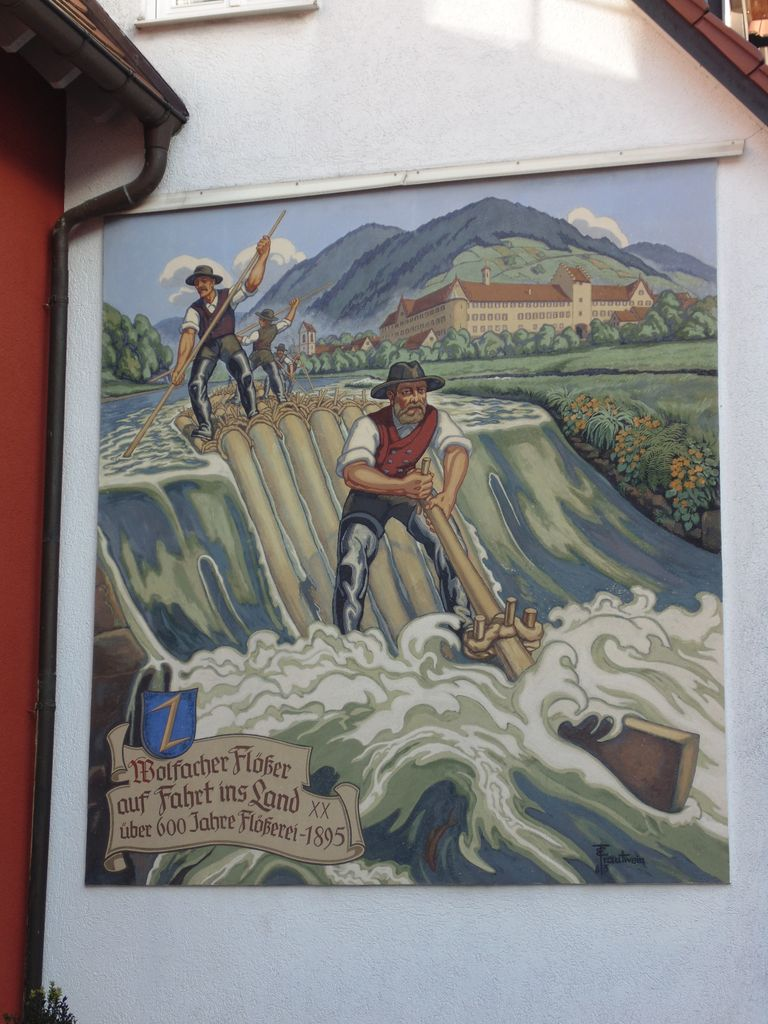 Fassadengemälde von Eduard Trautwein in Wolfach